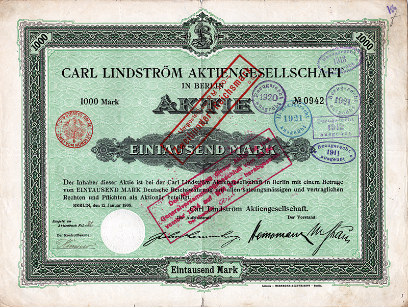 Aktie über 1000 Mark der Carl Lindström AG vom 12. Juni 1909